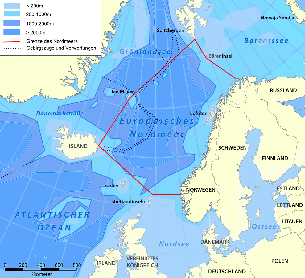 Europäisches Nordmeer mit Grenzen und Tiefenangaben (entspricht nicht den IHO-Grenzen)